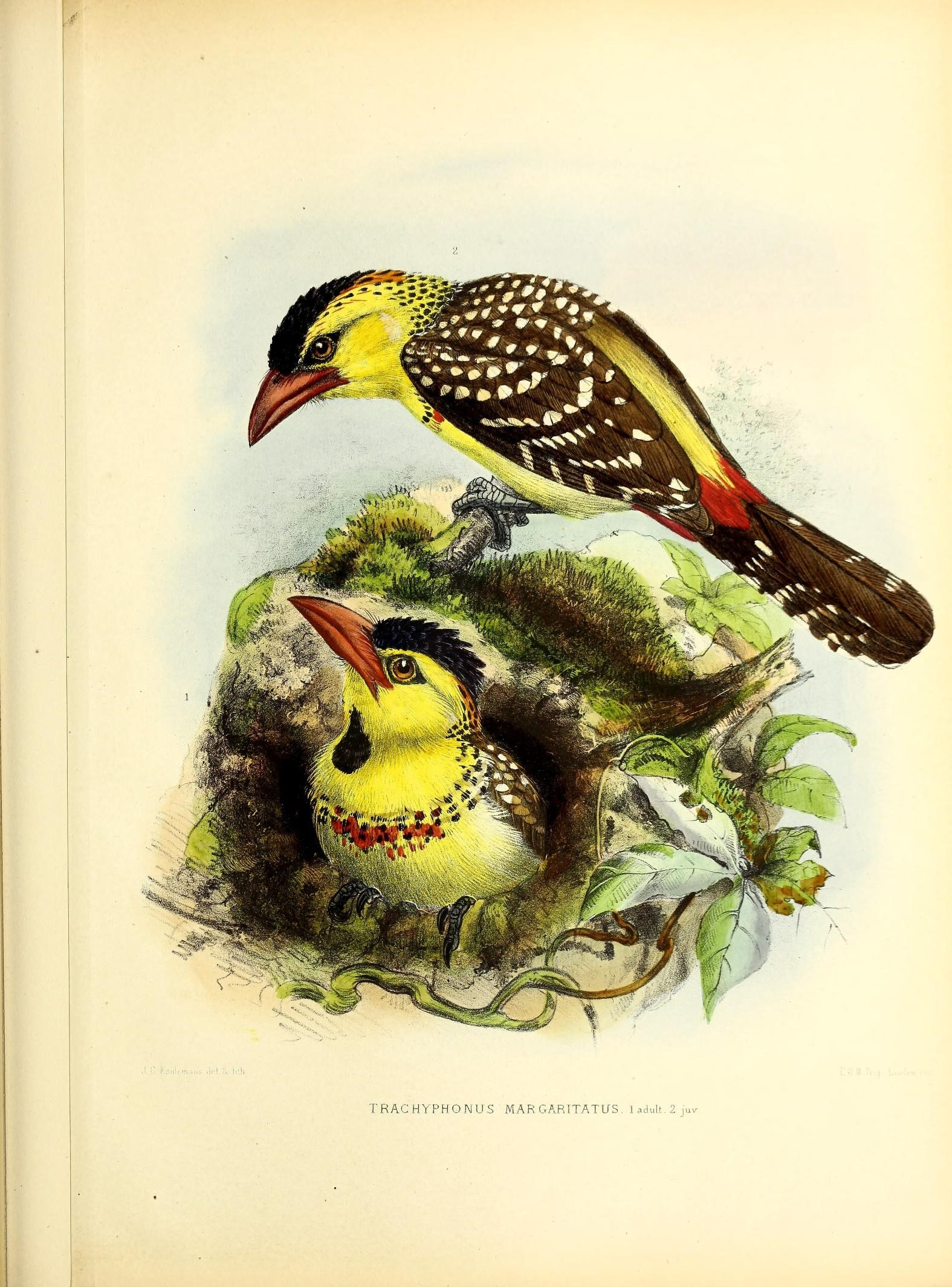 TRACHYPHOMUS MAR GARITATUS , laduU-2jW